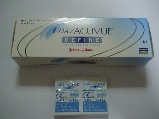 1DAY ACUVUE DEFINE (JAPAN)